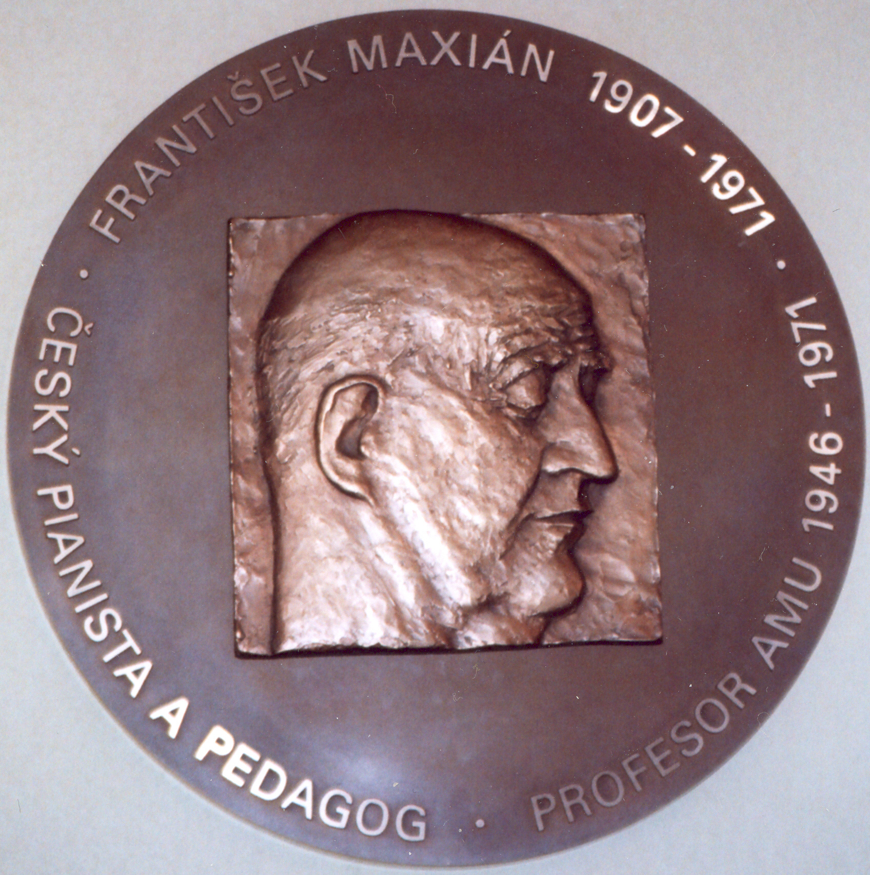 František Maxián, pamětní deska v budově Hudební fakulty AMU v Lichtenštejnském paláci na Malé Straně